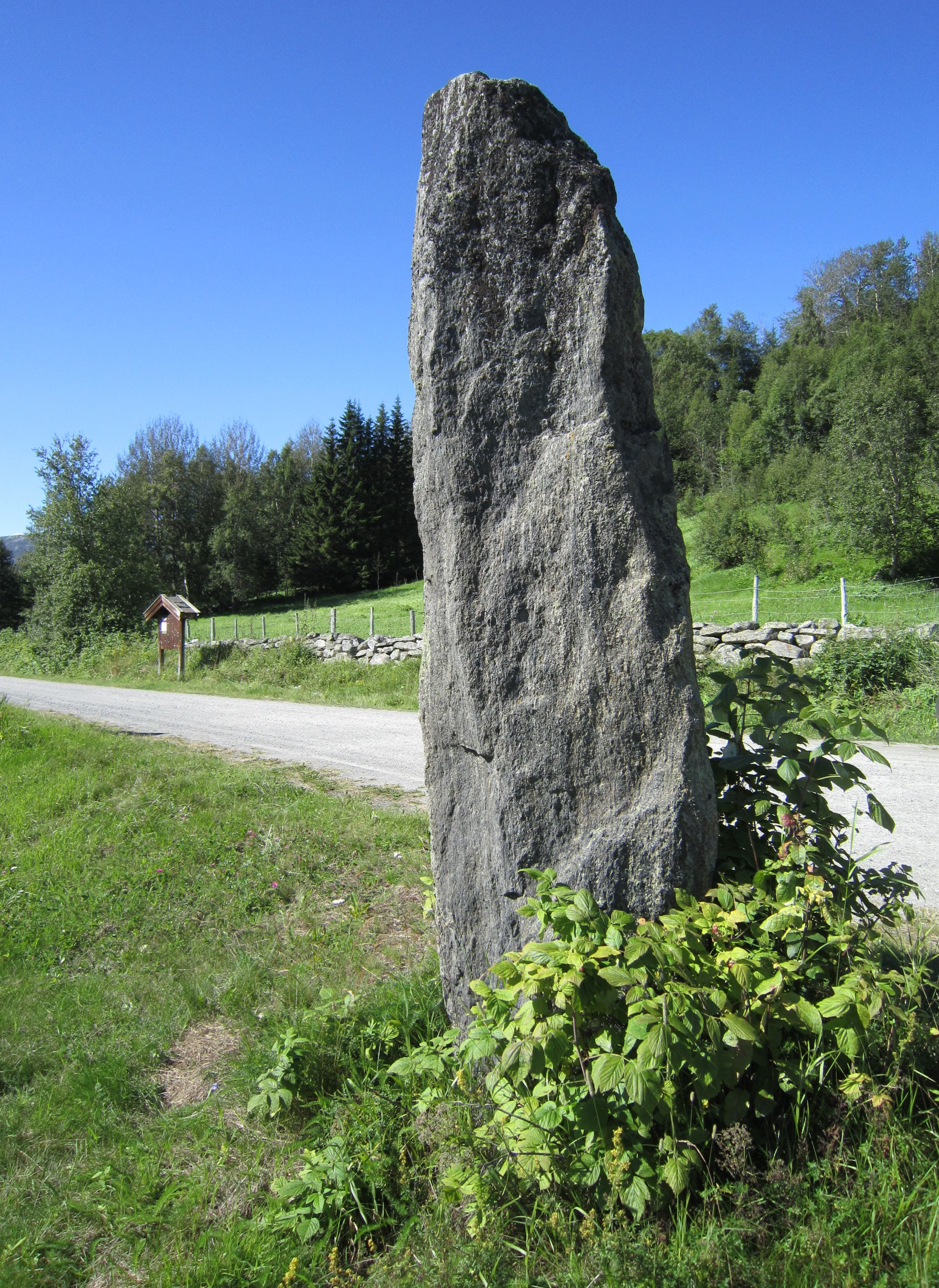 Bautastein i Einbu